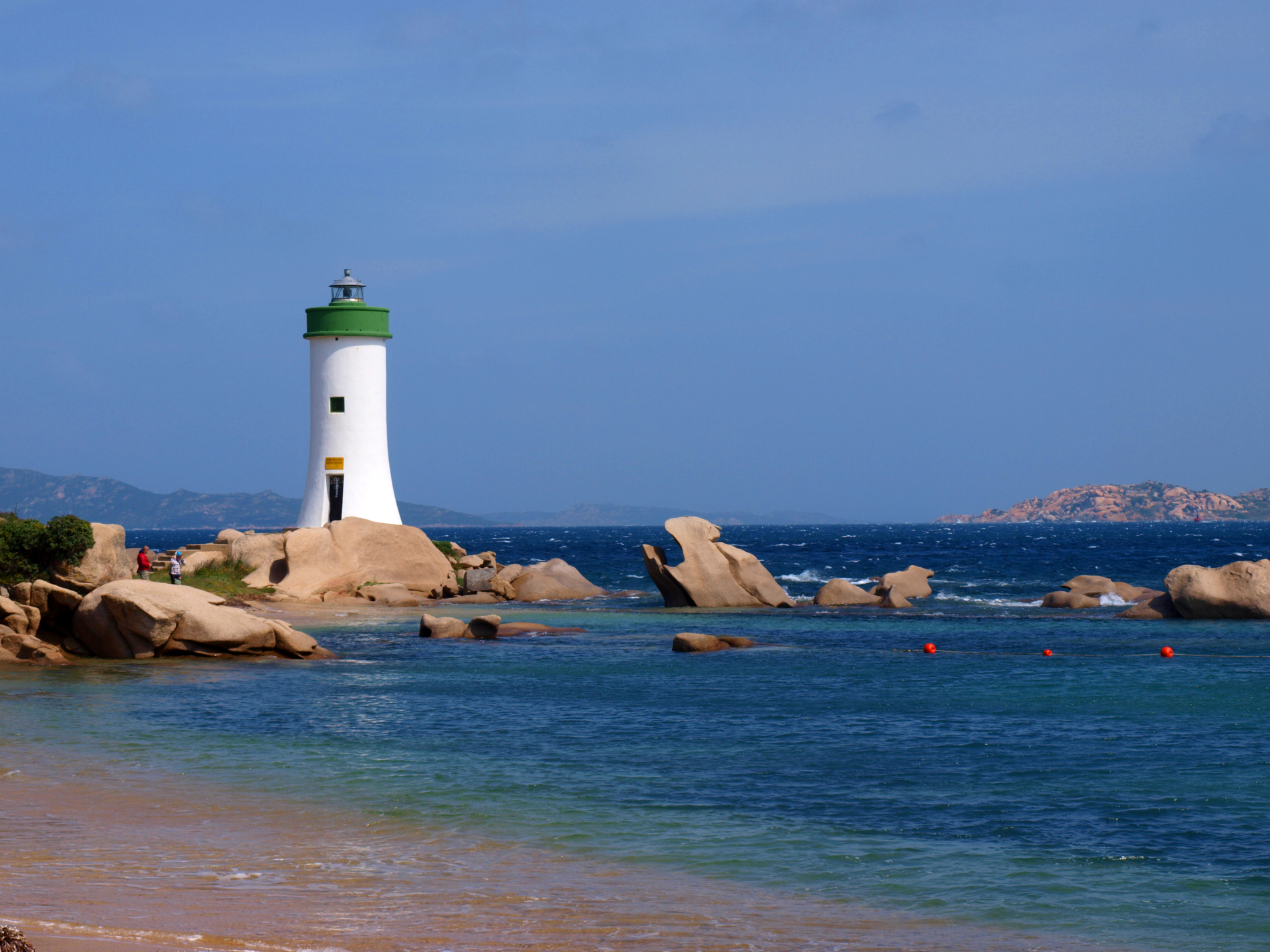 Faro di Palau